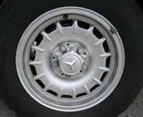 MB-Leichtmetallfelge 1968 / Hersteller Otto Fuchs KG